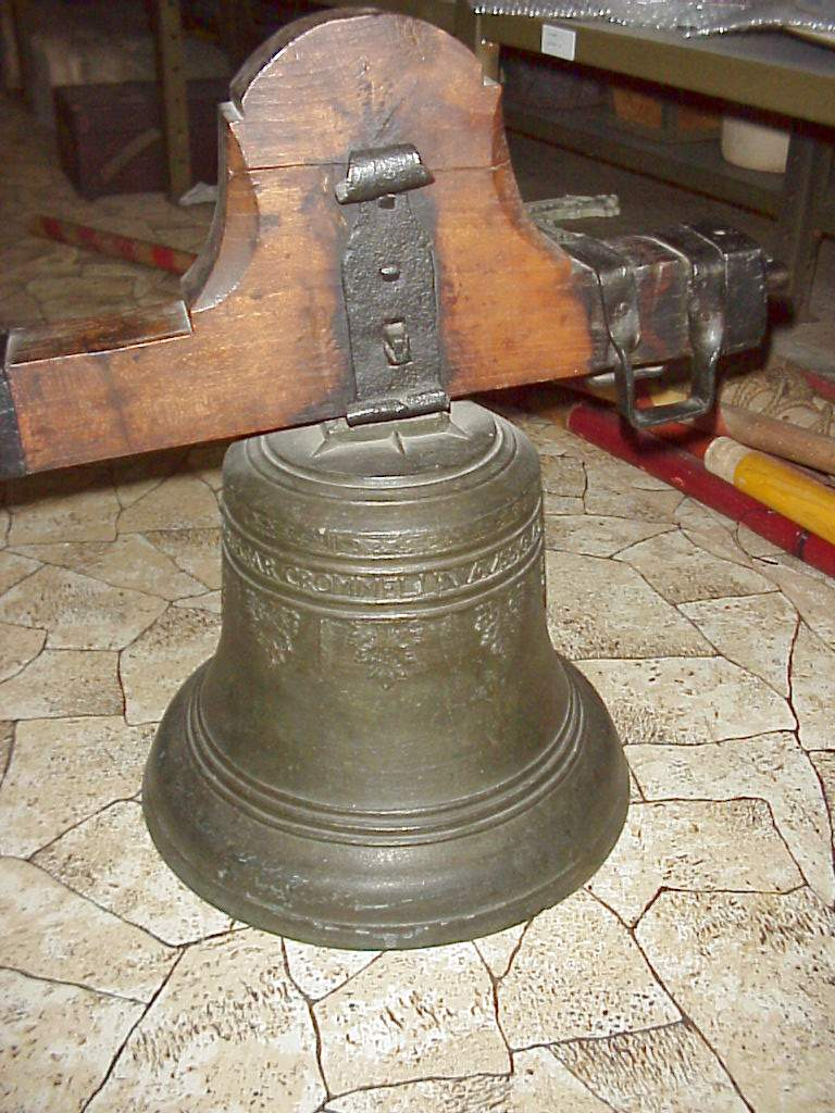 bell in Ústí nad Labem